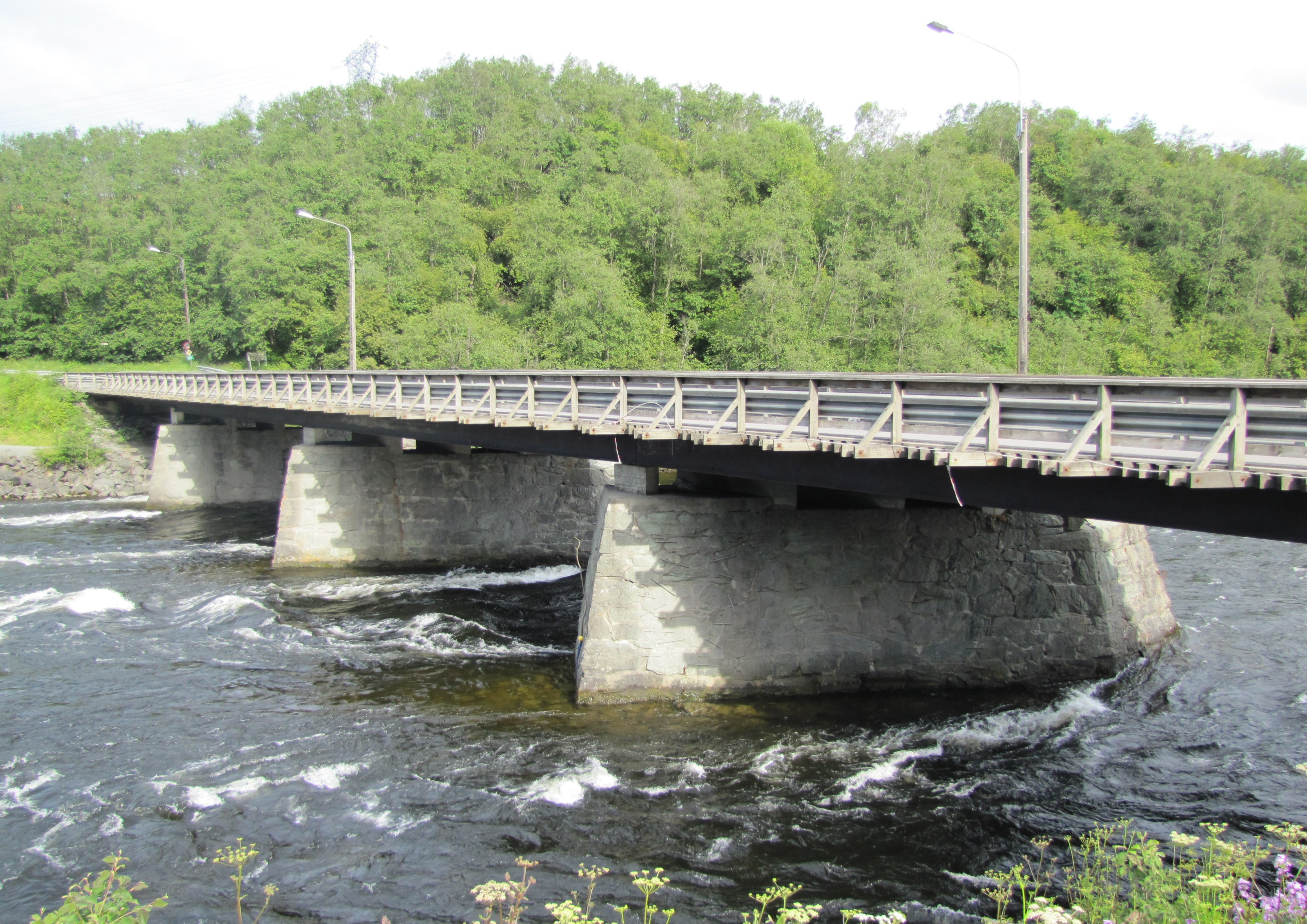 Sluppen bru, Trondheim